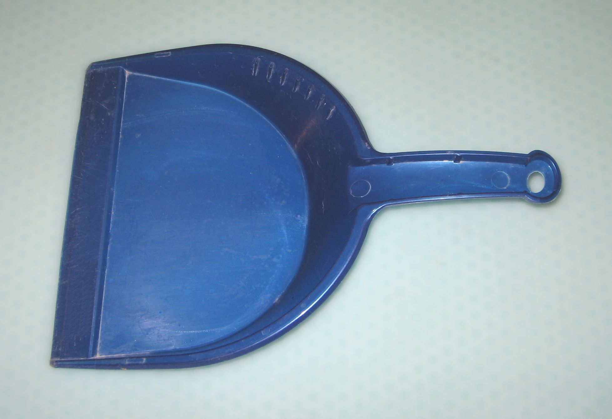 eo Sxovelilo por planko. ru Совок для пола. Mi, auxtoro de la bildo, permesas al cxiuj uzi gxin kun cxi tiuj kondicxoj